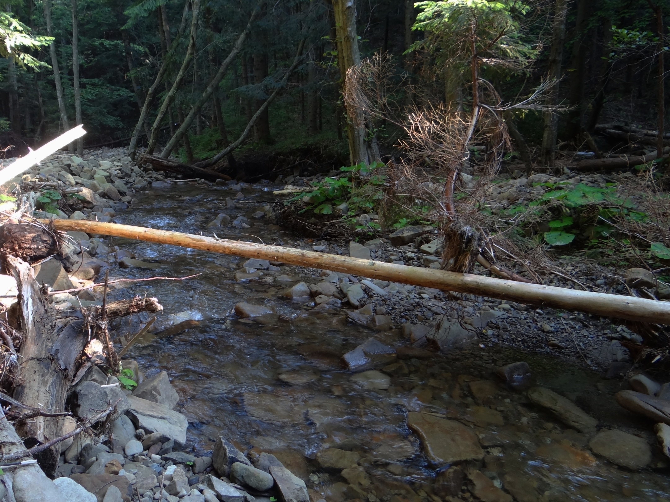 Marków Potok